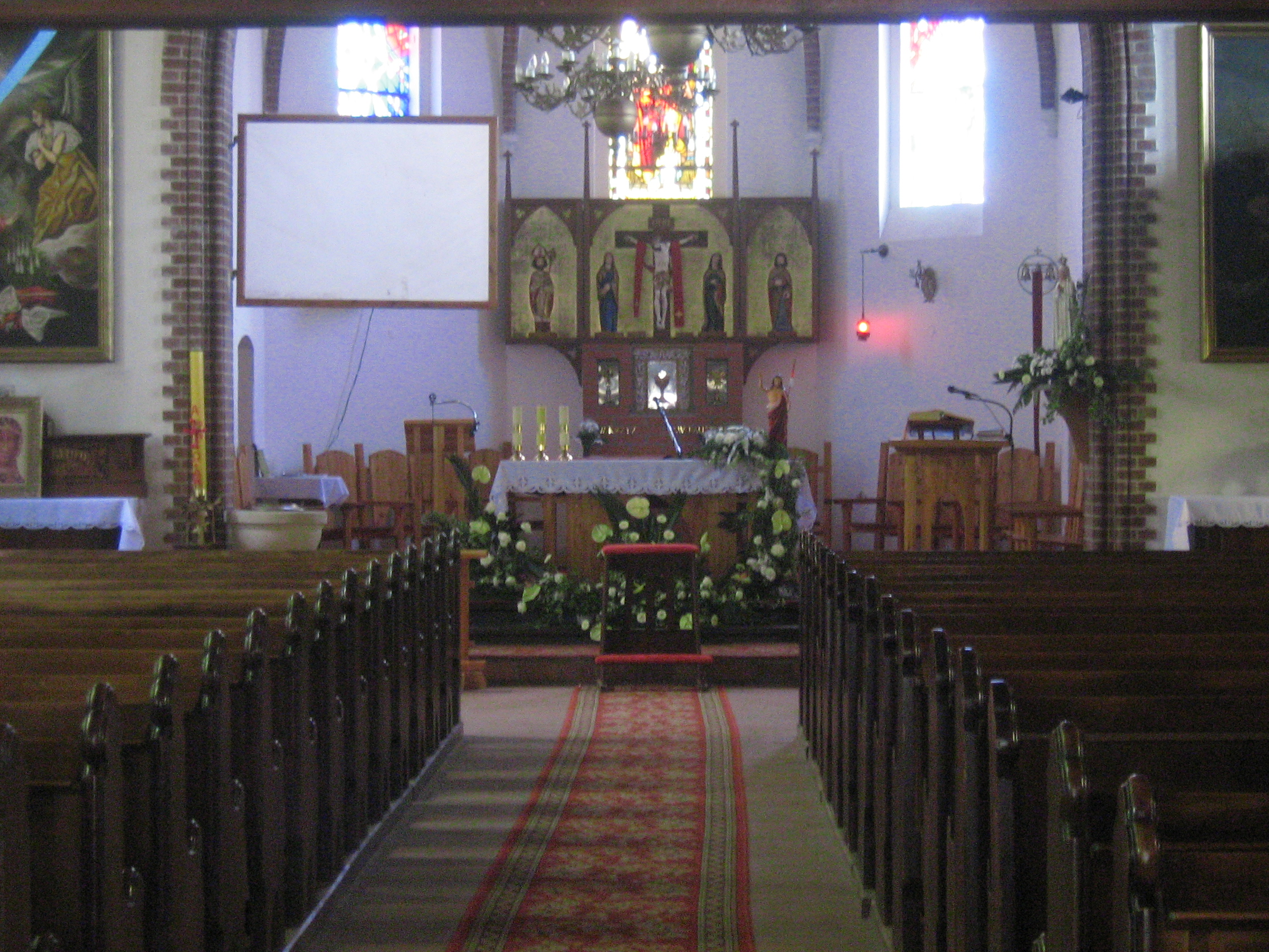 Kościół Najświętszego Serca Pana Jezusa w Świnoujściu